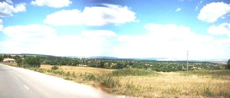 Поглед към село Славяново, община Попово от пътя за село Долец - юли 2008 год. Фото: Вл. Стойков